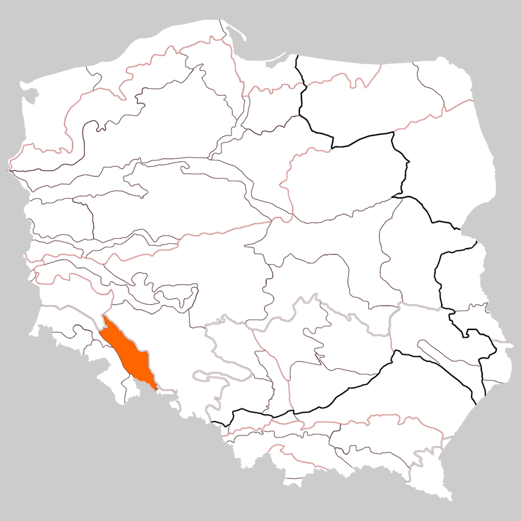 Physico-geographical regionalization of Poland Macroregion 332.1 Sudetes Foreland Regionalizacja fizycznogeograficzna Polski Makroregion 332.1 Przedgórze Sudeckie